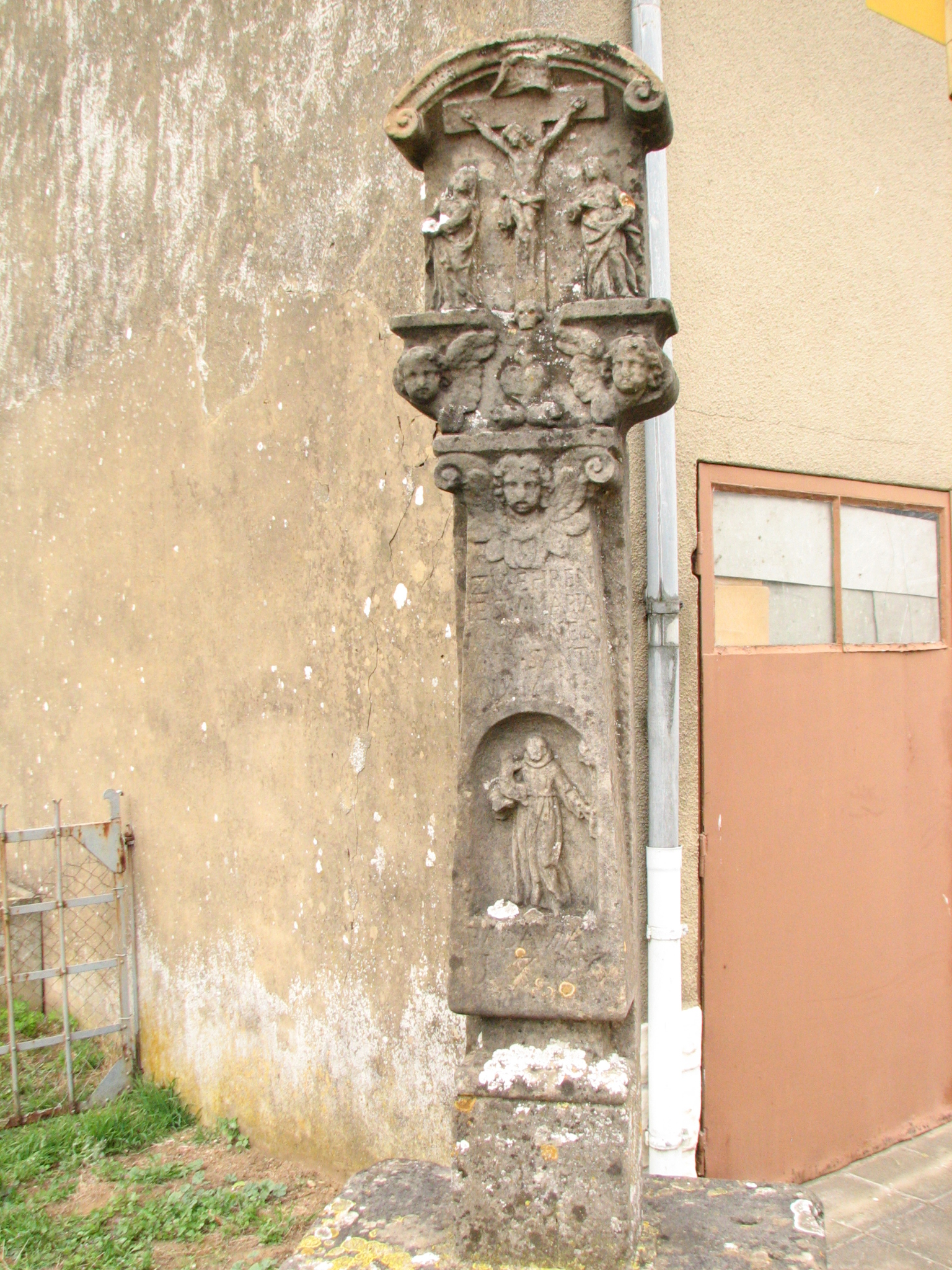 Calvaire situé rue Albert Ier à Buvange, à côté de l'immeuble n° 83 et sur un excédent de voirie